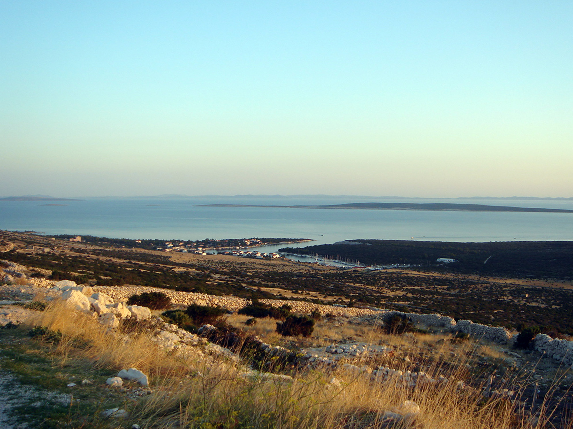 Over Simuni